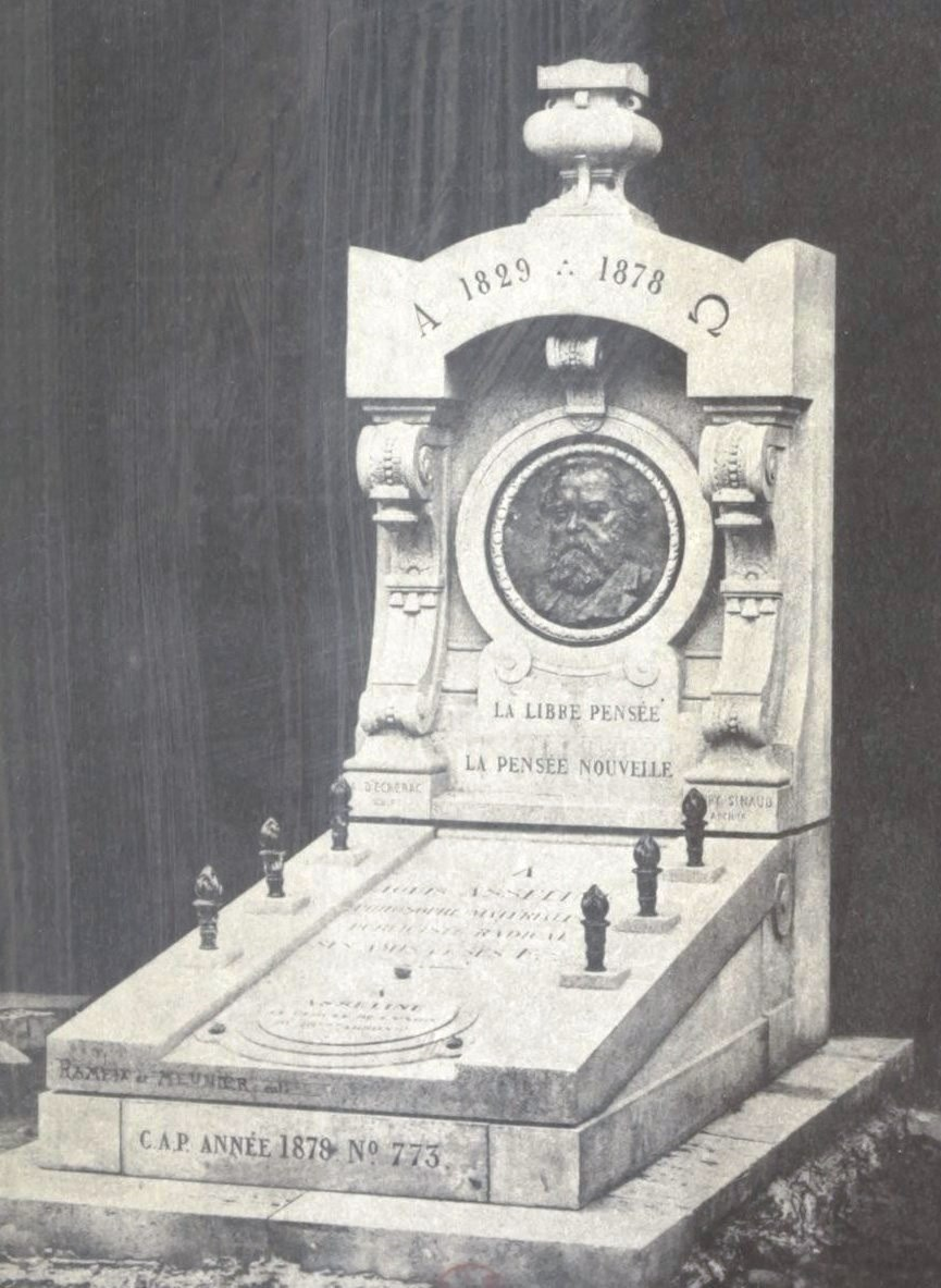 Monument funéraire de Louis Asseline, 1880.